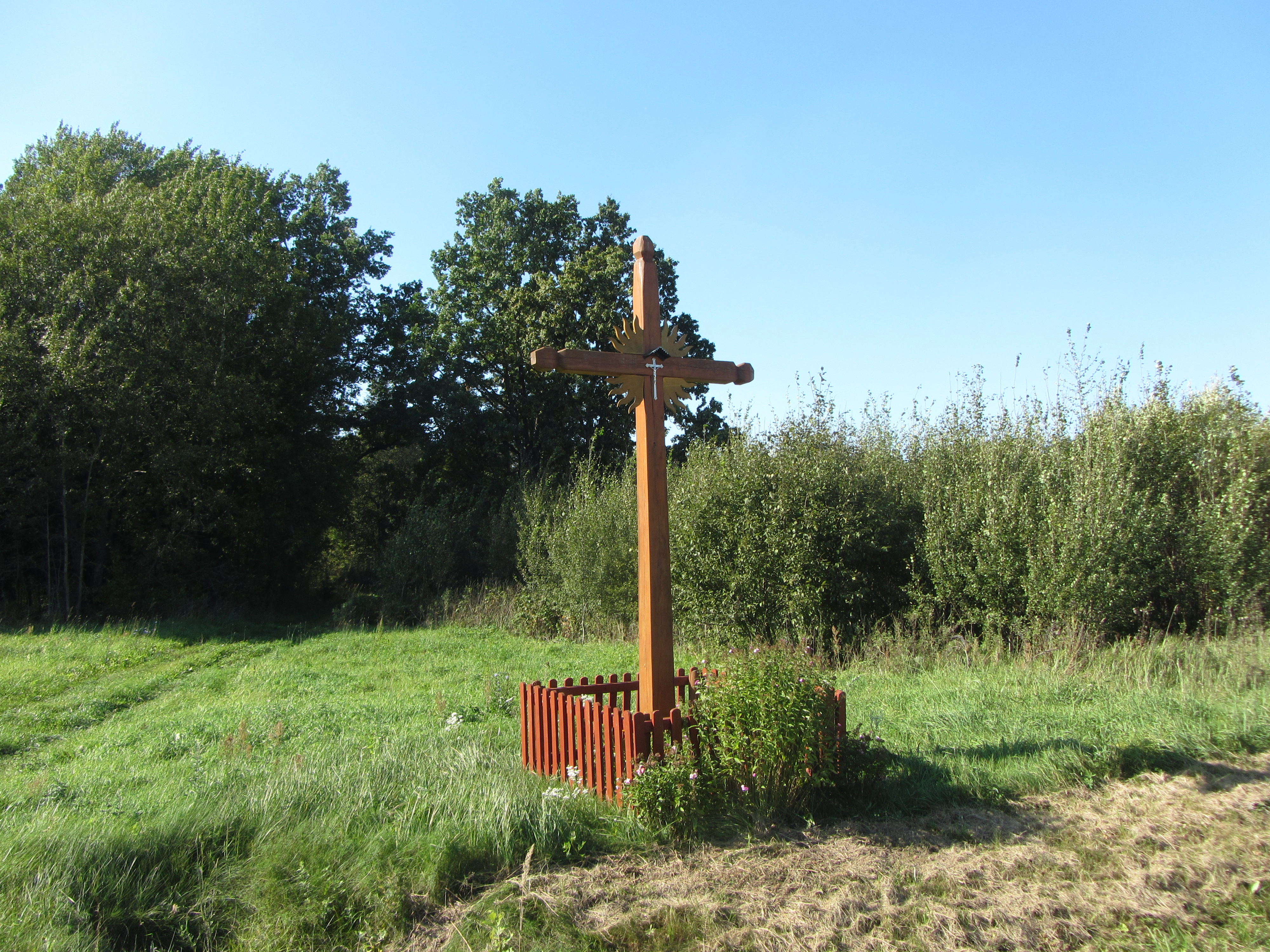 Jakėnų sen., Lithuania